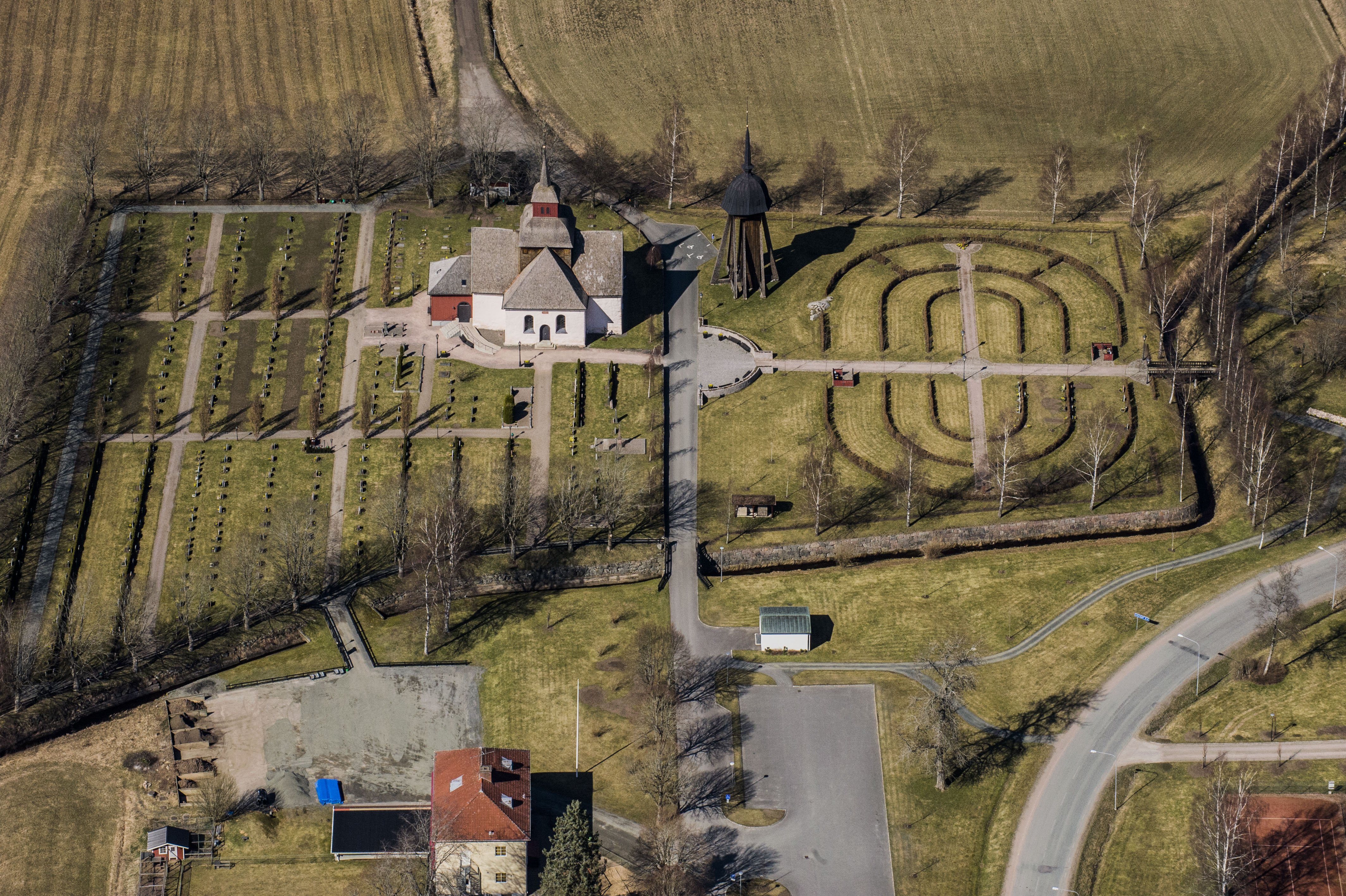 Hakarps kyrka